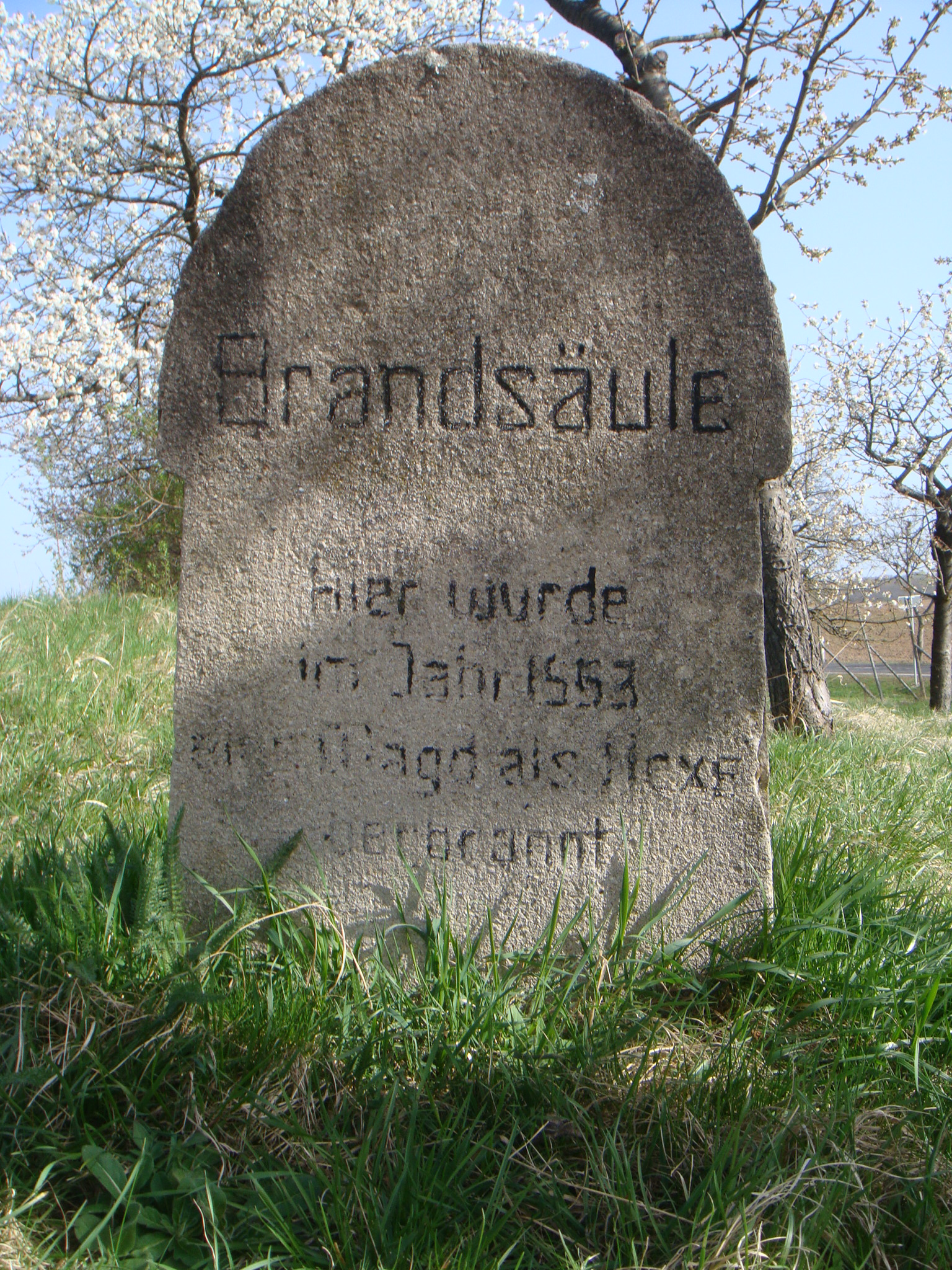 Brandsäule zur Erinnerung an eine Hexenverbrennung 1563 in Eckartsberga